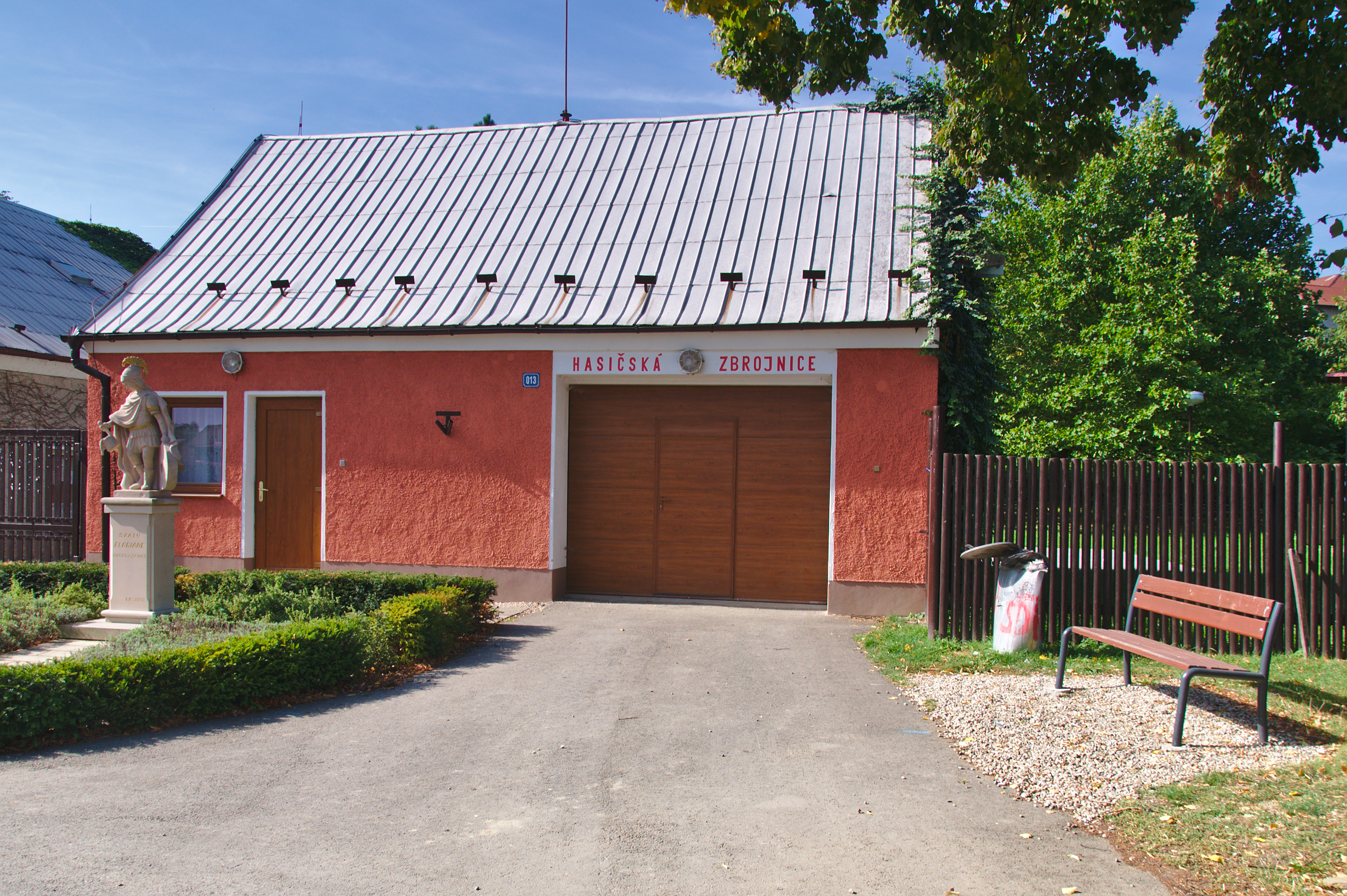 Hasičská zbrojnice, Ludéřov, Drahanovice, okres Olomouc